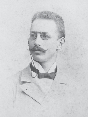 Antonio Piscel (1871-1947)